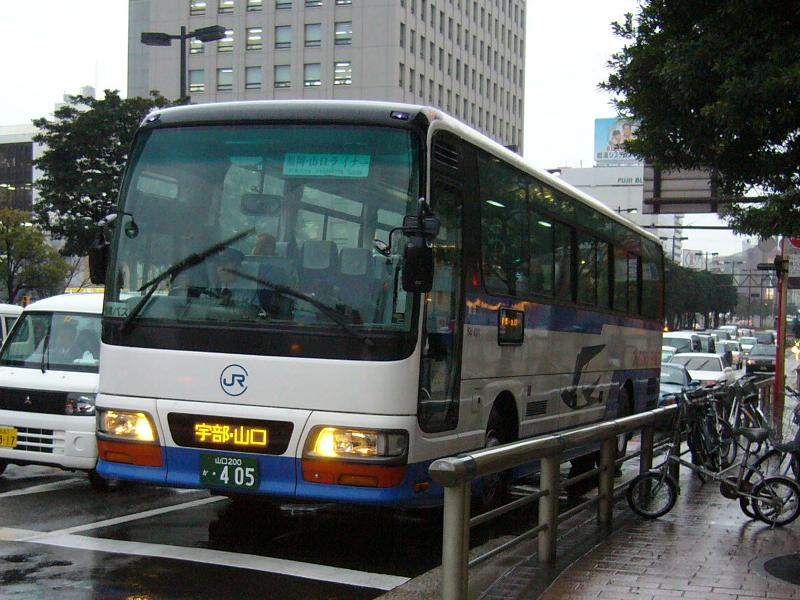 登録番号 山口200か・405 中国ジェイアールバス(Chugoku JR bus)所属 車番641-4911 福岡・山口ライナー用用 いすゞ・ガーラ KL-LV781R2